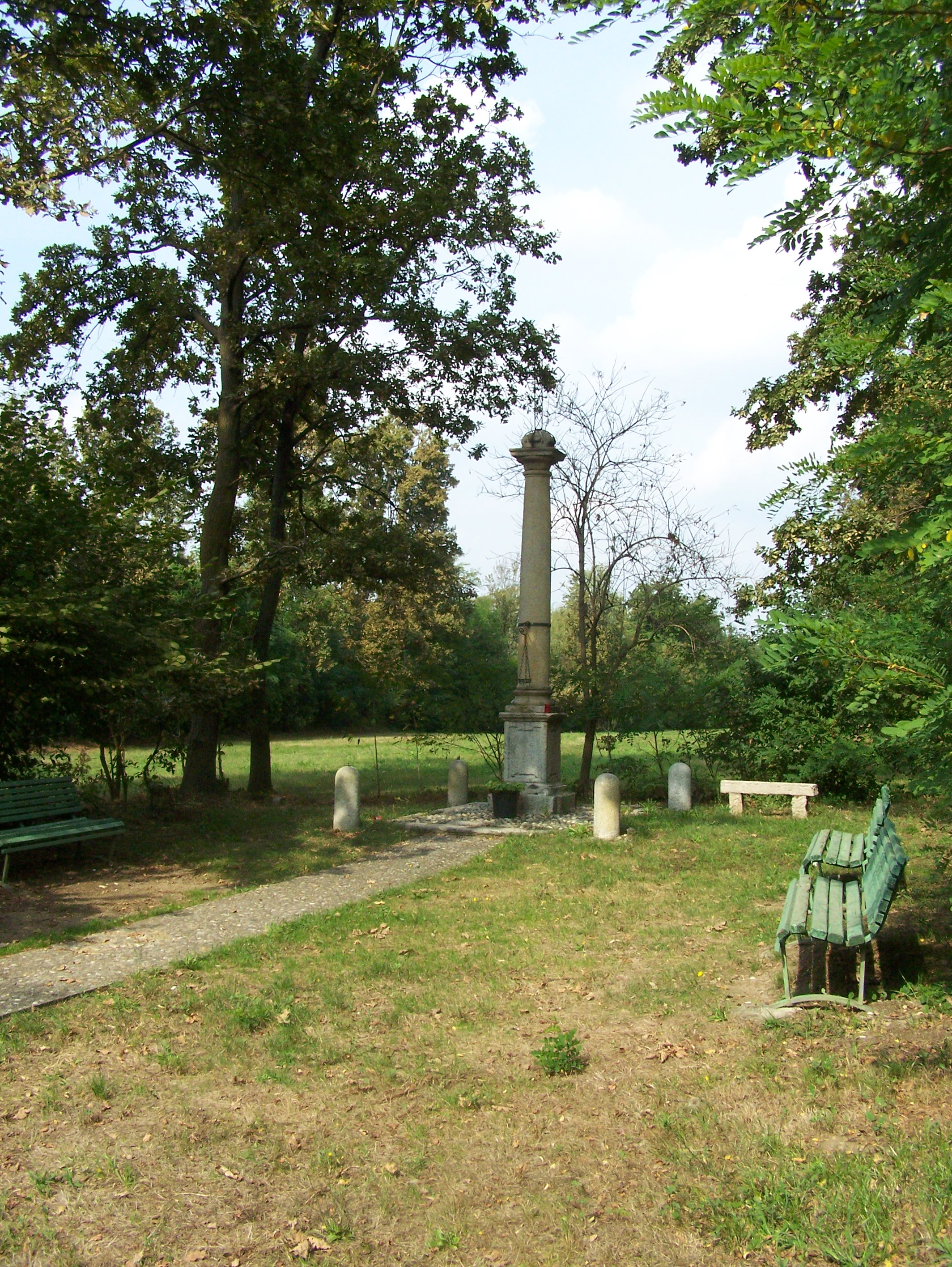 Il Lazzaretto di Corbetta (MI) - Italy